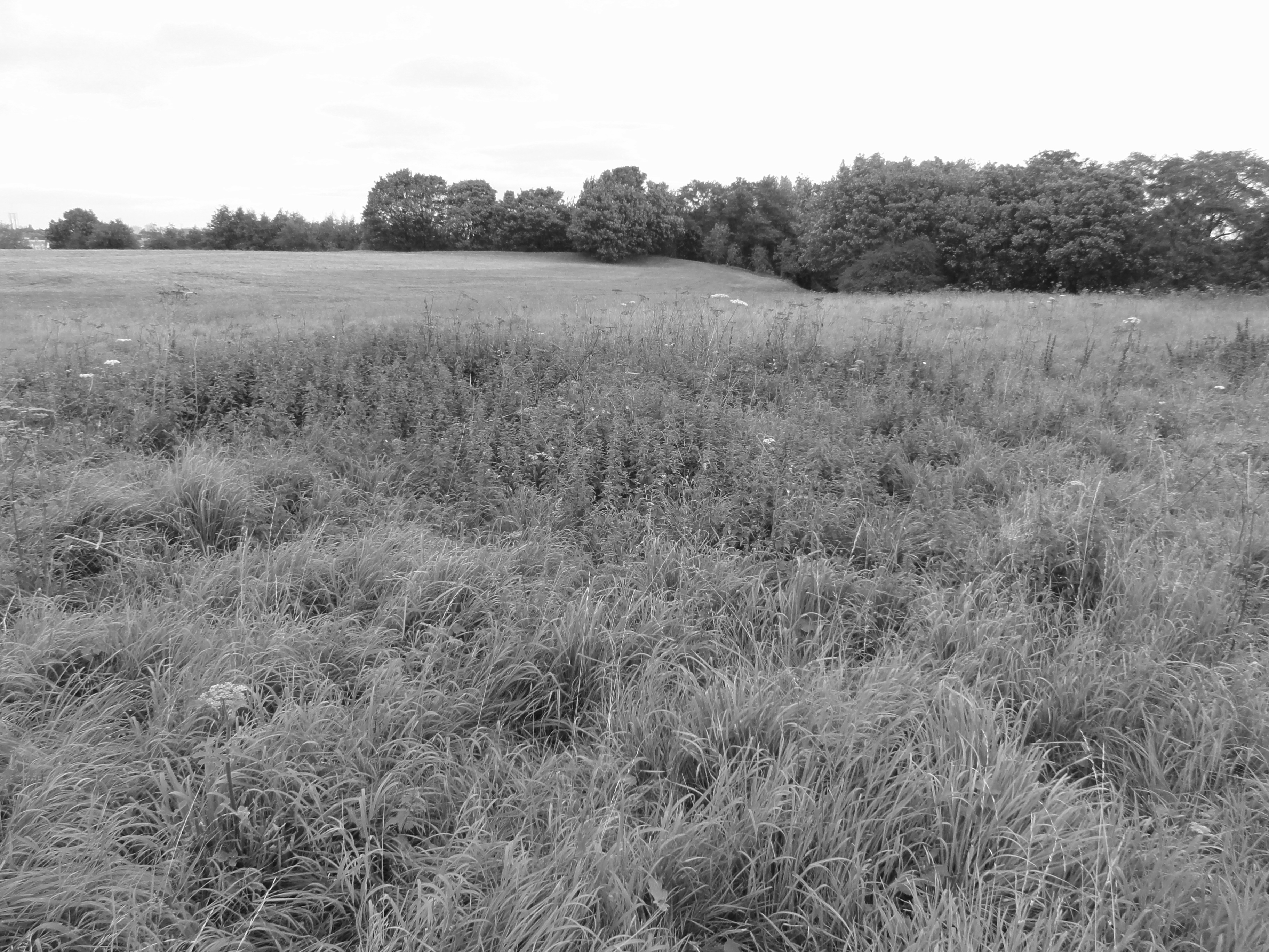 Terril n° 81A dit 5 de Lens Ouest, Fosse n° 5 - 5 bis de la Compagnie des mines de Lens, Lens, Pas-de-Calais, Nord-Pas-de-Calais, France.